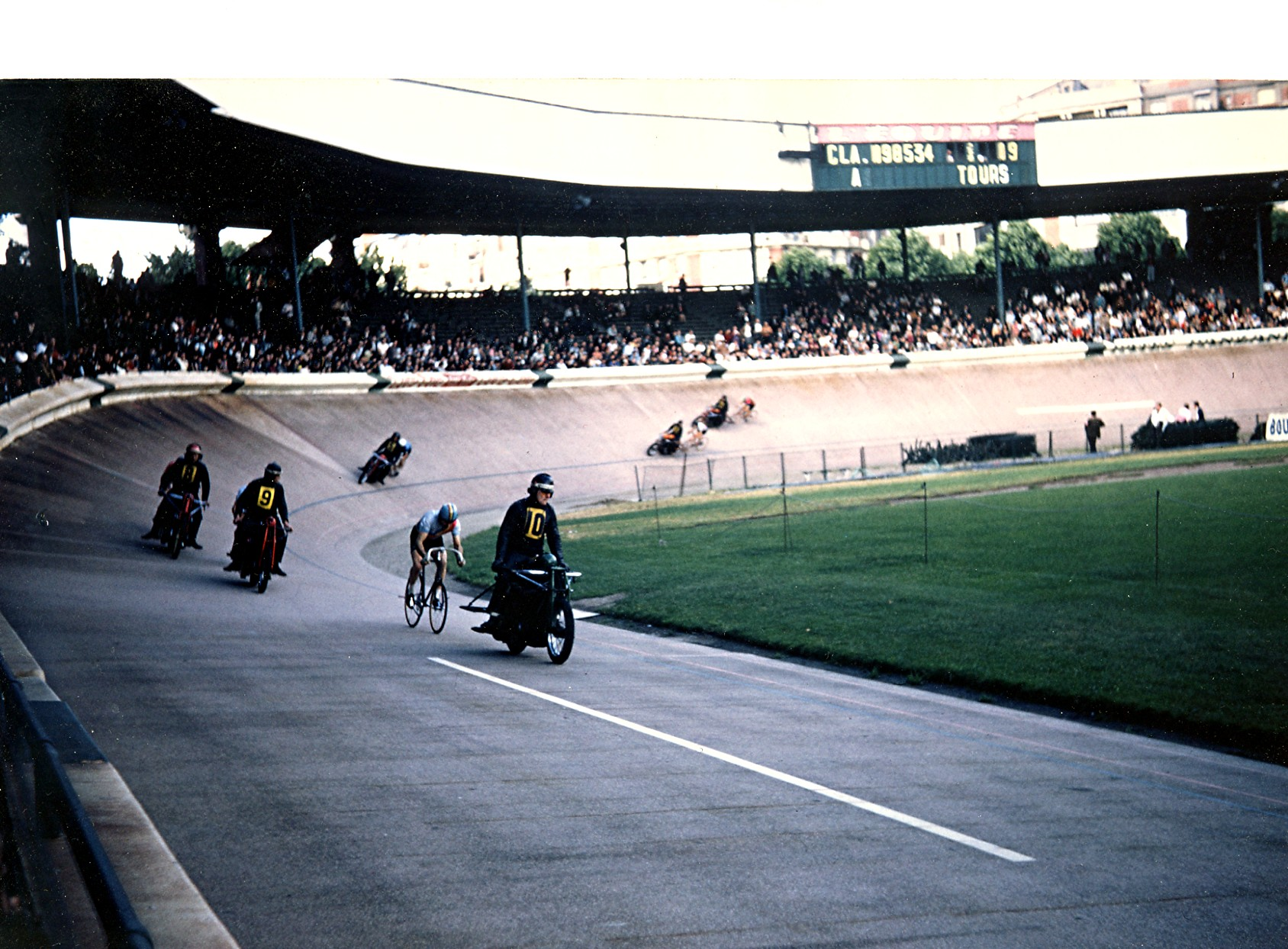 course de demi-fond andre.broutee